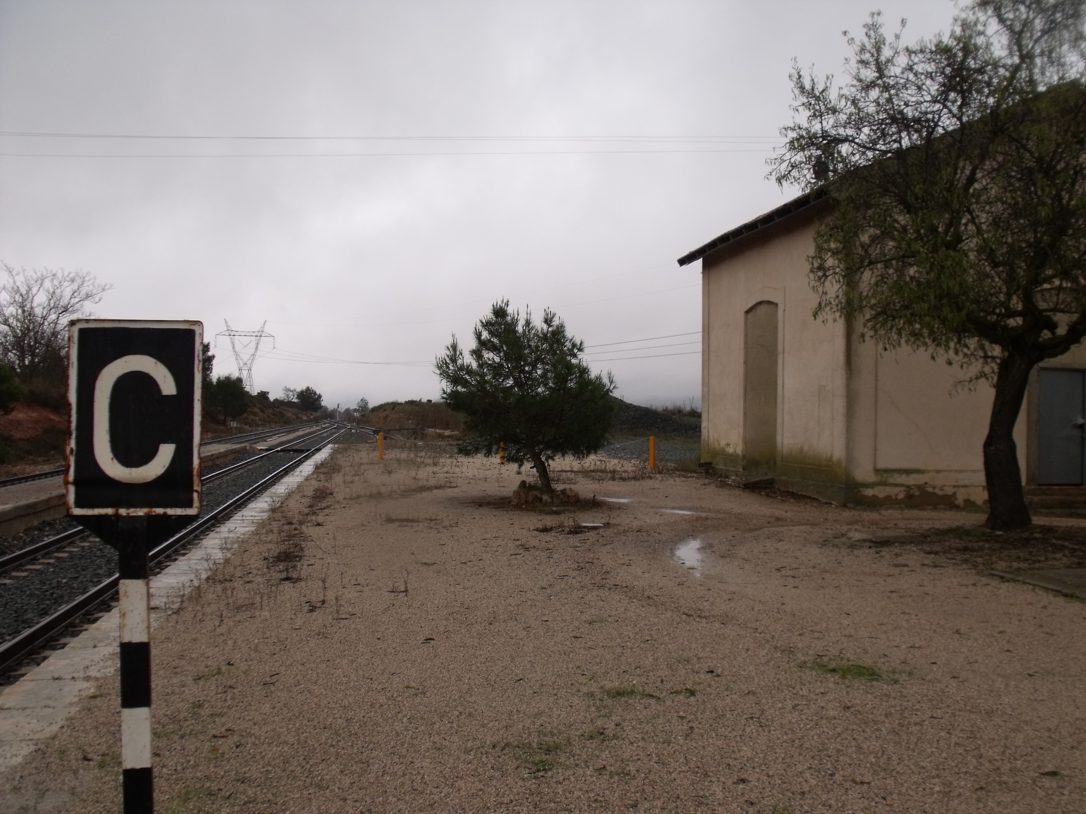 Diversas vistas de la estación de El Rebollar